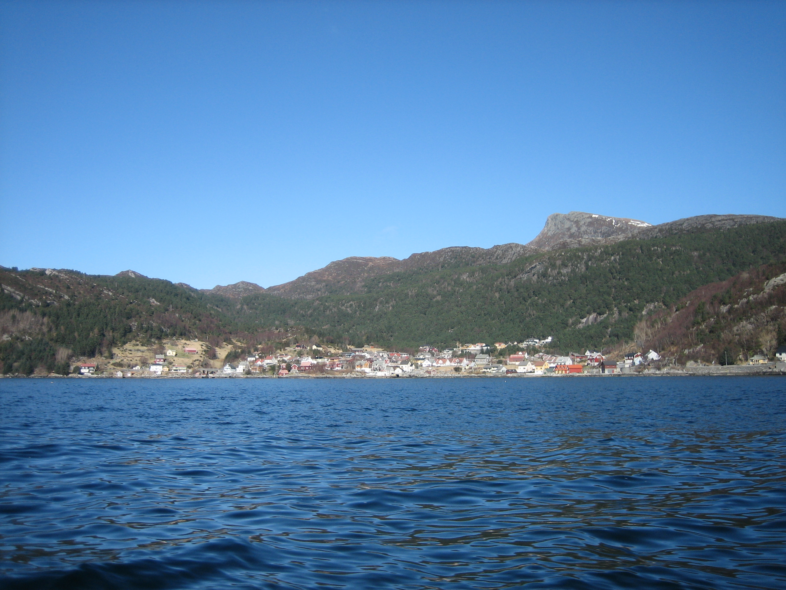 Holvik i Vågsøy i Sogn og Fjordane